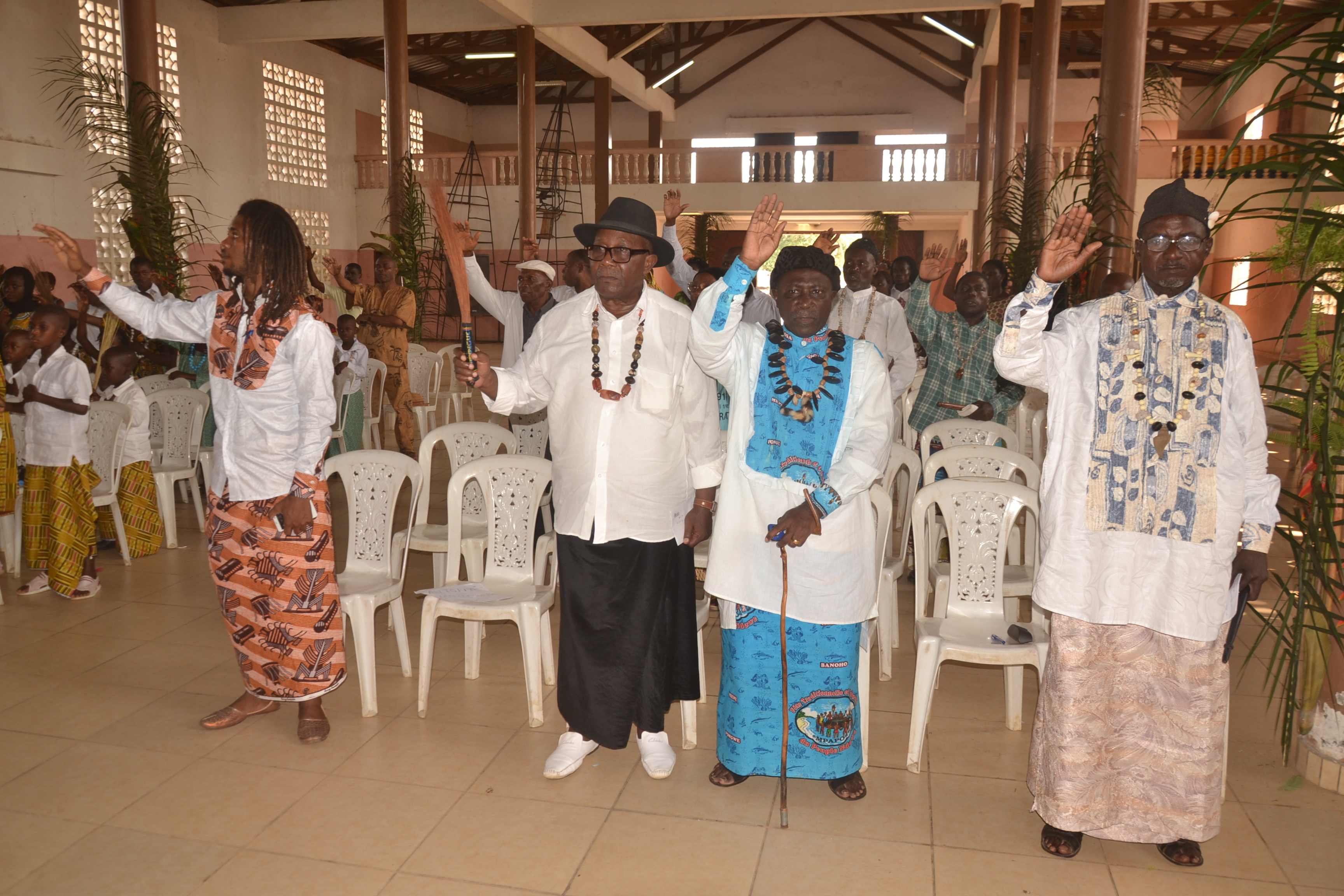 tenue traditionnelle des Ndowe Batanga composée du Sanja ou tissu pagne, du Mpondo ou chemise décorée assortie du ngelesia ou collier en coquillages, et d'un chasse mouche et d'un baton de commandement pour l'autorité traditionnelle. This is an image of Cultural Fashion or Adornment from Cameroon